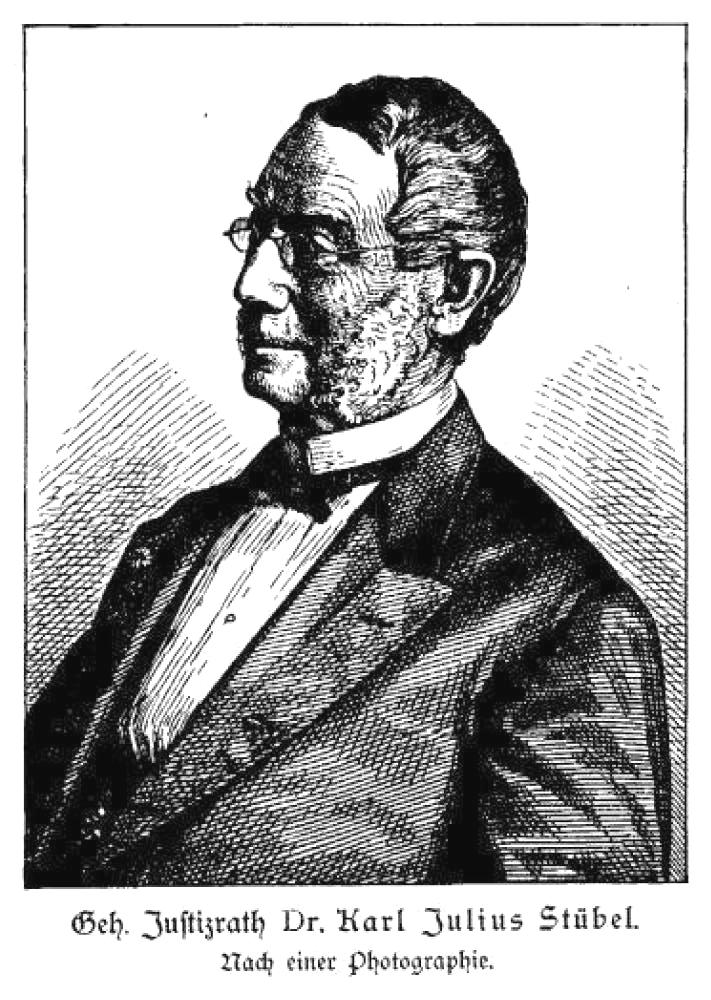 Geheimer Justizrat Carl Julius Stöckel, Ehrenbürger Dresdens, 1802–1891